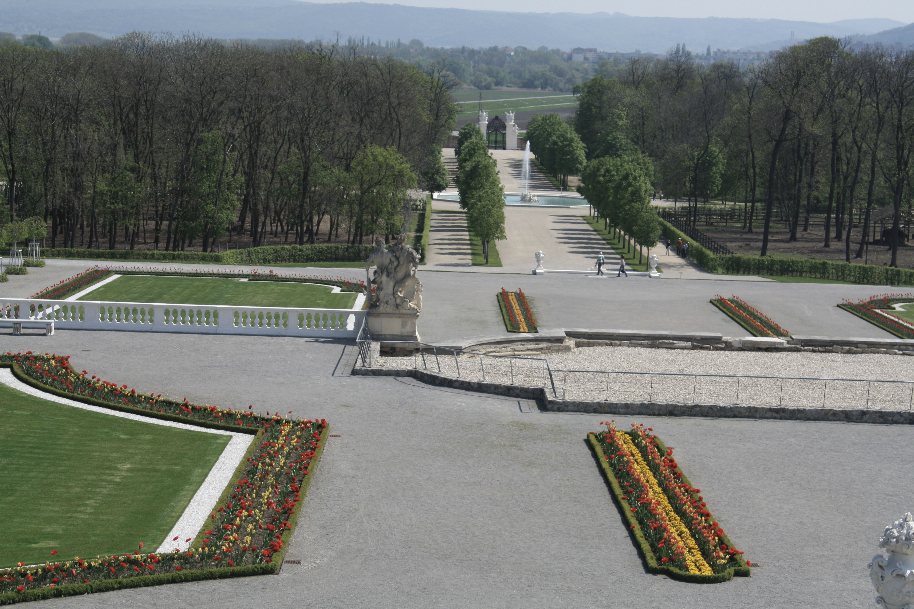 Schloss Hof in Niederösterreich, Austria